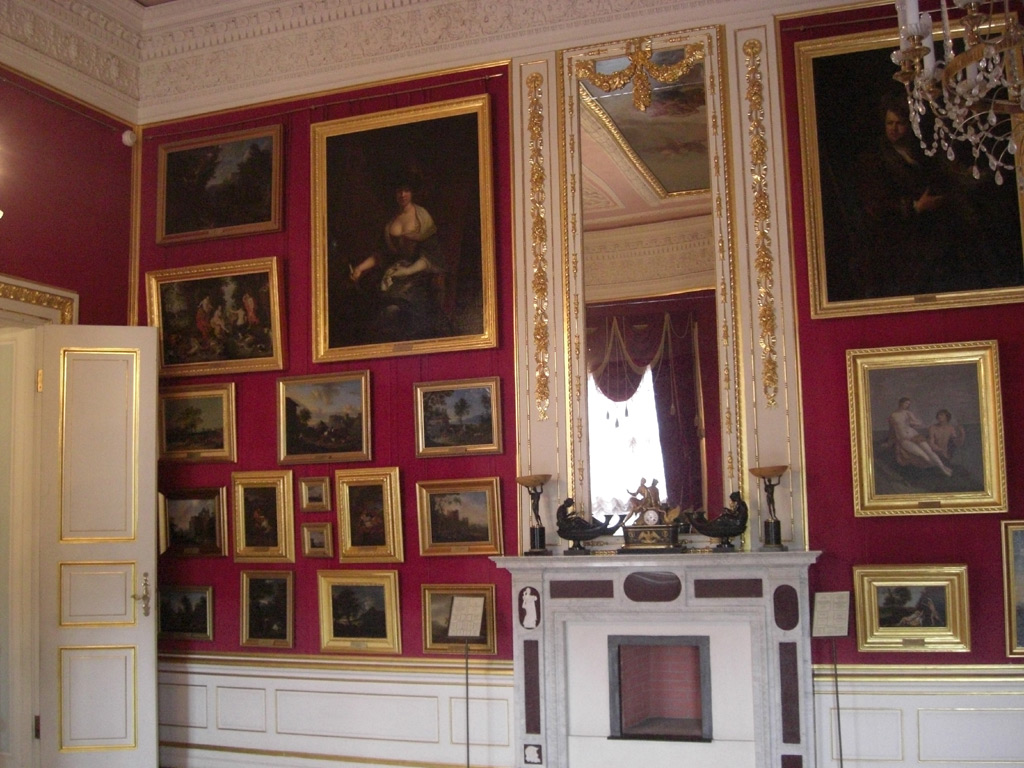 Тронная императрицы Марии Фёдоровны в Большом Гатчинском дворце